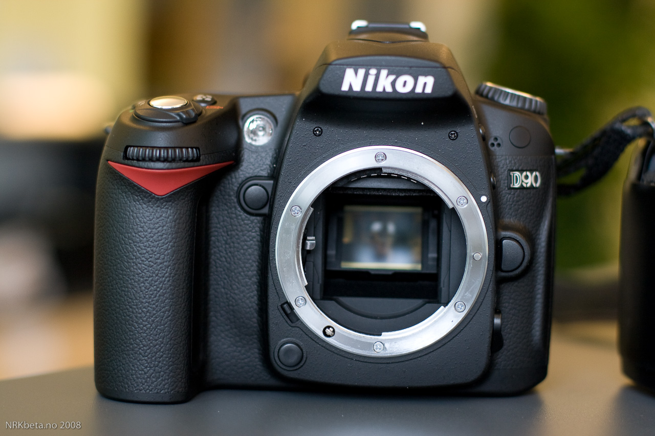 Nikon D90 digital SLR camera